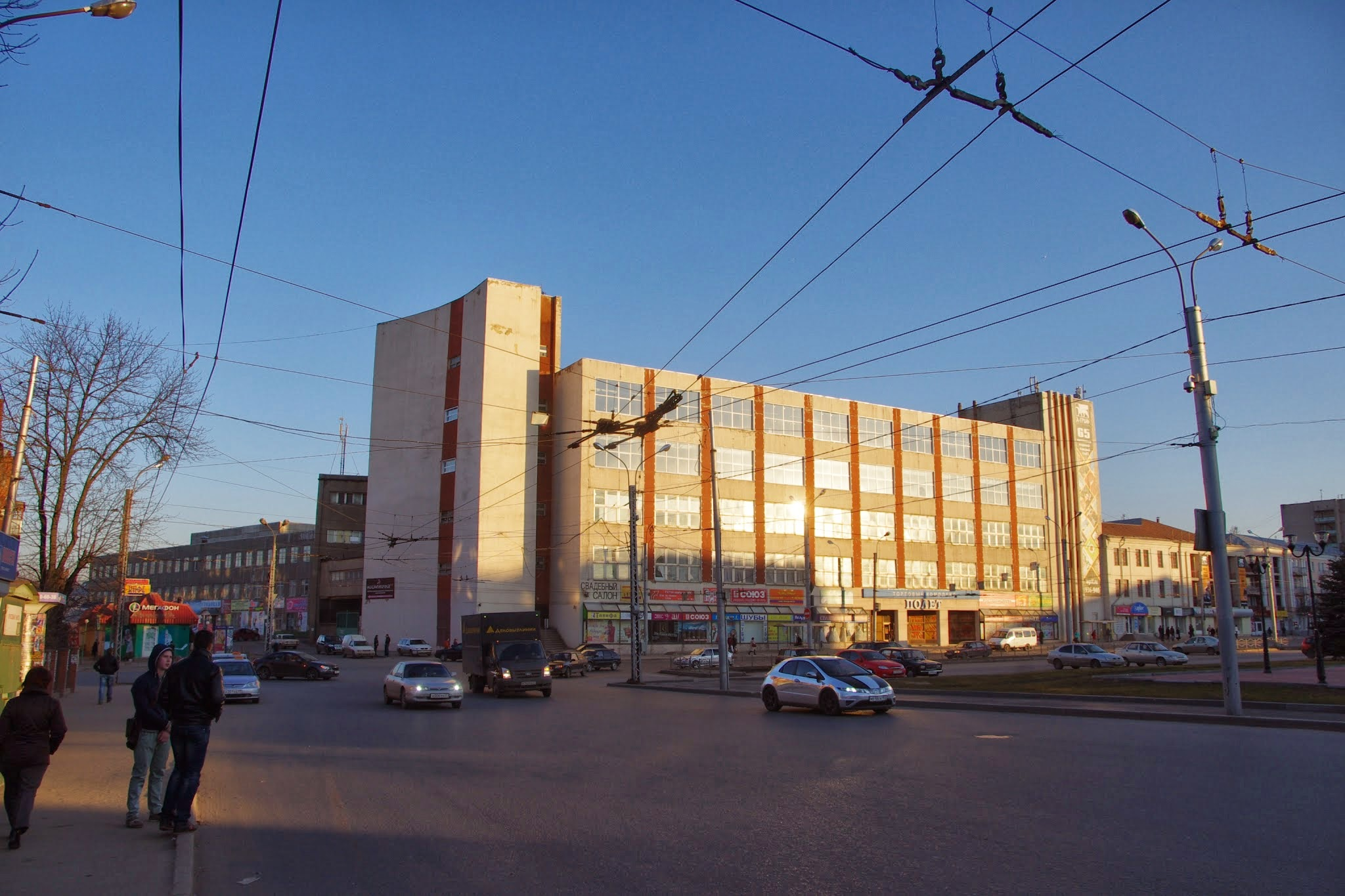 Frunzenskiy r-n, Ivanovo, Ivanovskaya oblast', Russia